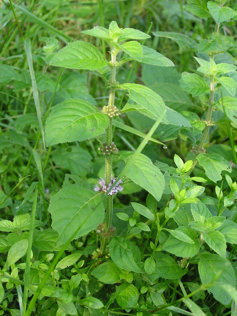 Mentha arvensis an einem nassen Wegrand bei Rheinbach